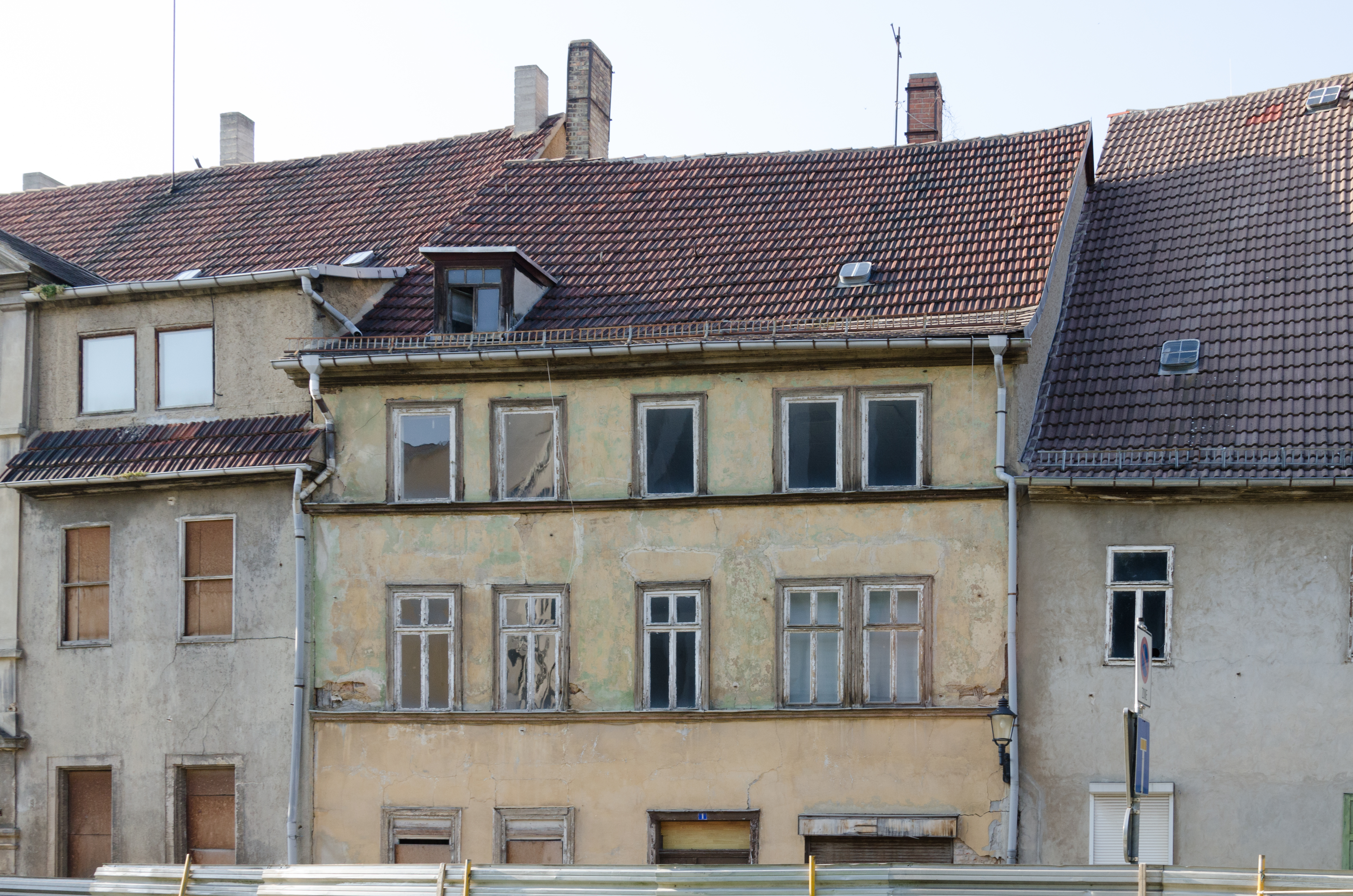 Naumburg, Othmarsweg 1